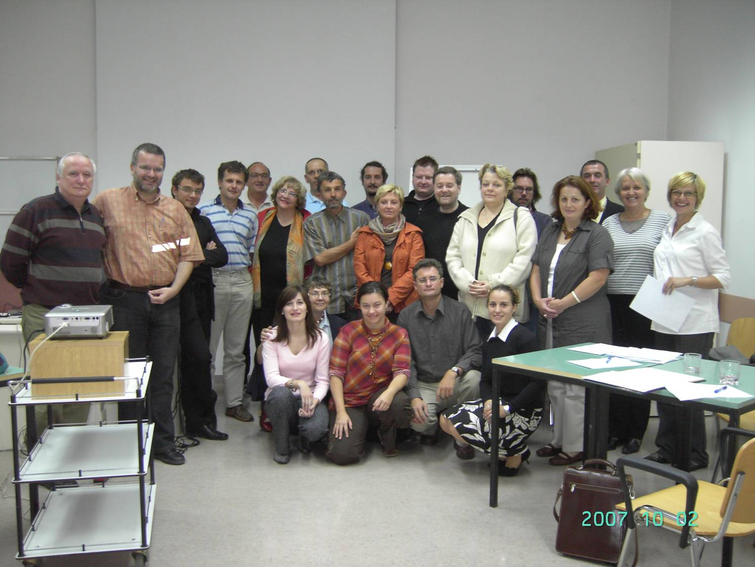 Opis: Pogum - društvo za dostojanstvo pri delu, ustanovni člani